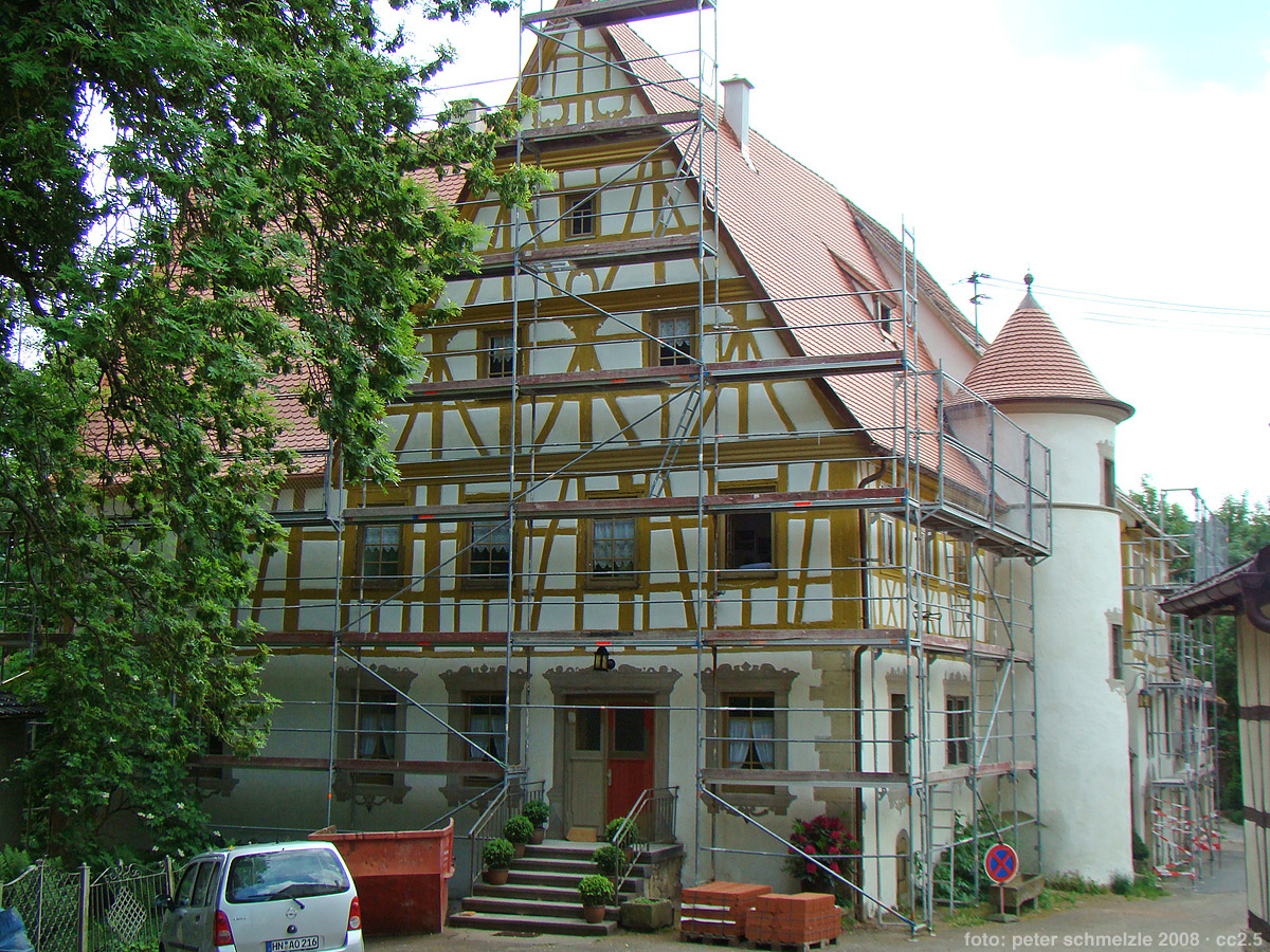 Ehem. Gemmingensches Schloss in Widdern